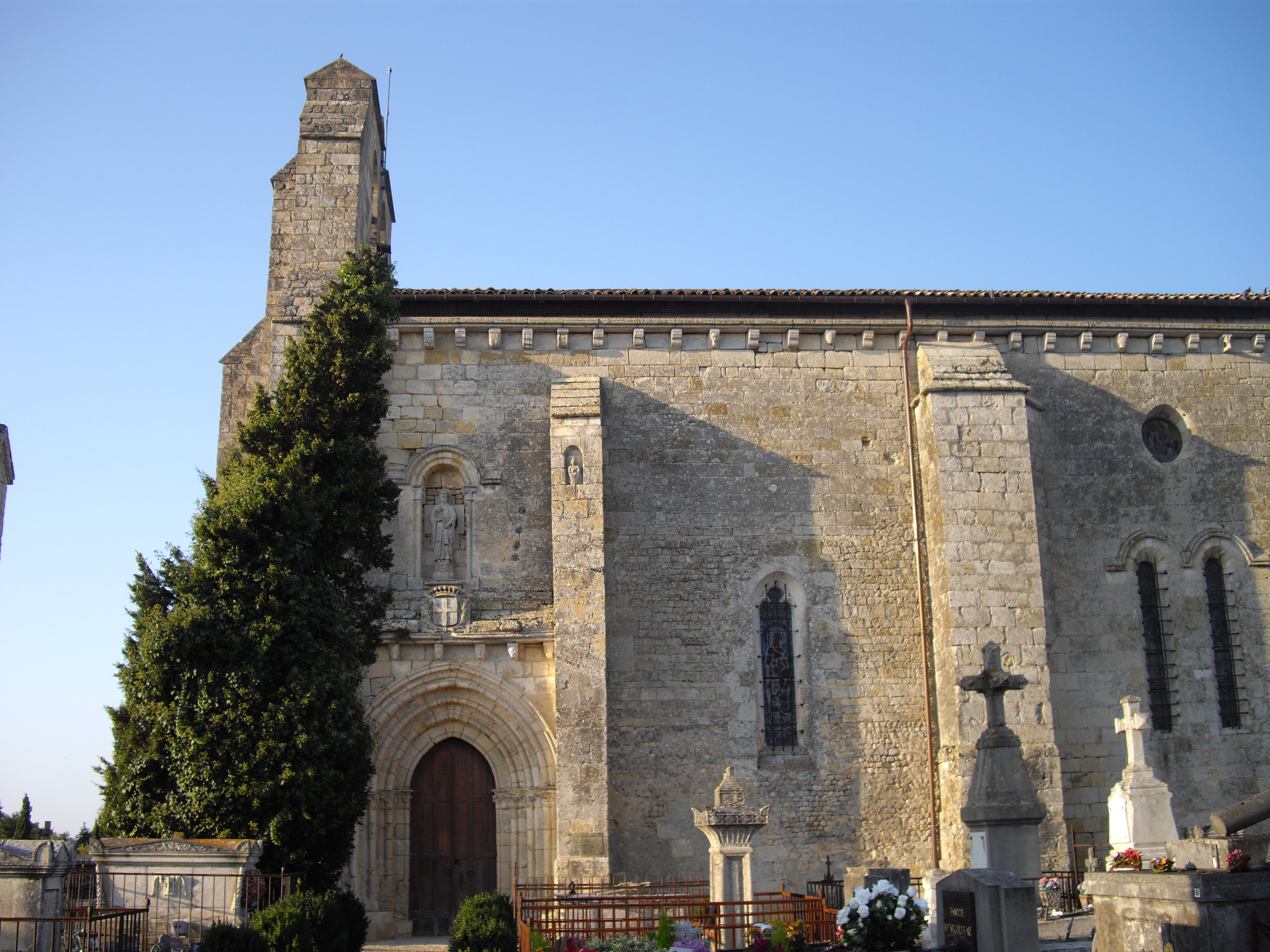 Église Saint-Pierre de La Sauve, Gironde, France